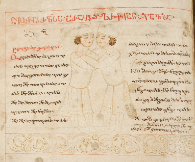 შერეული კრებული